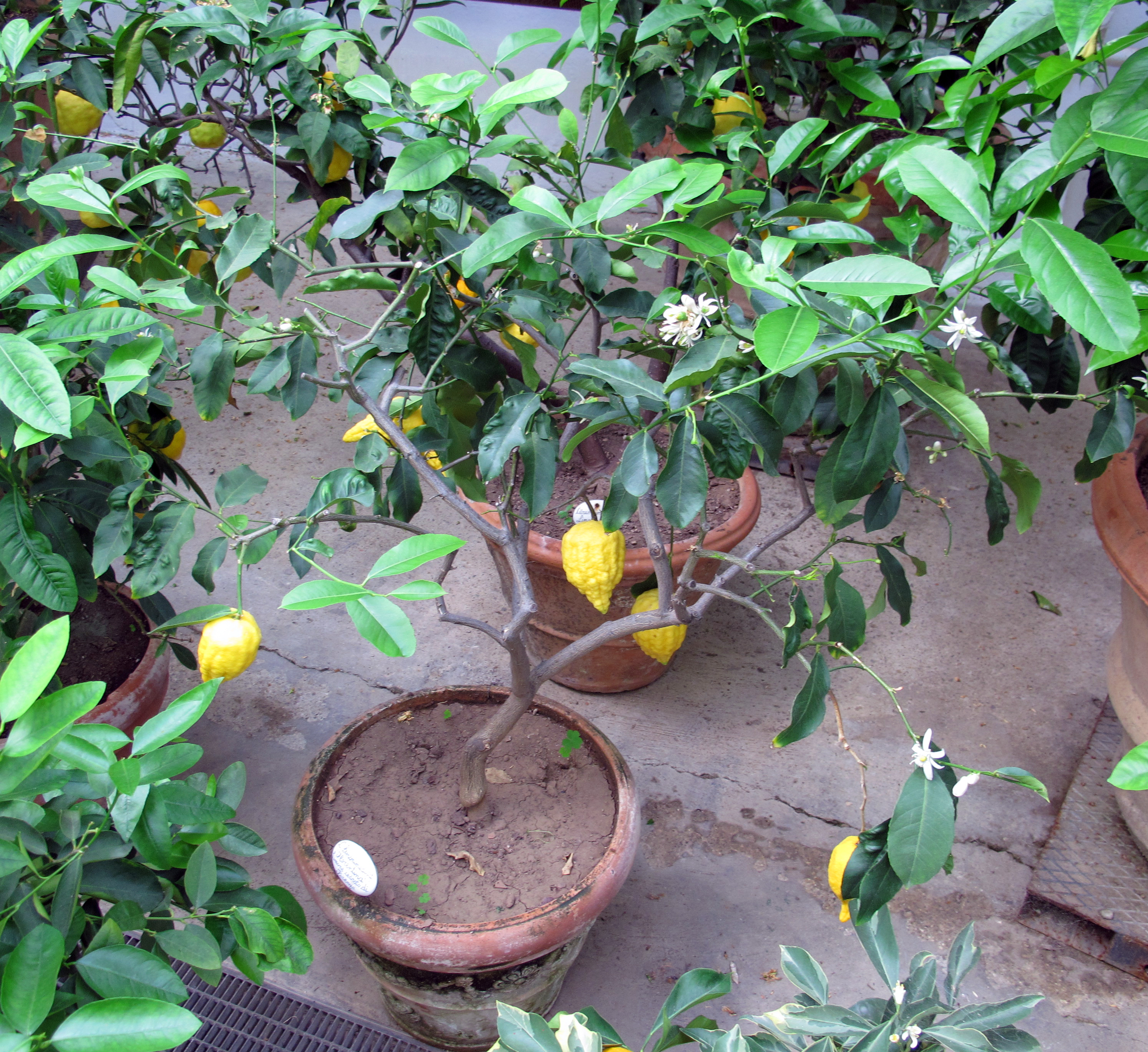 Orto Botanico, Firenze